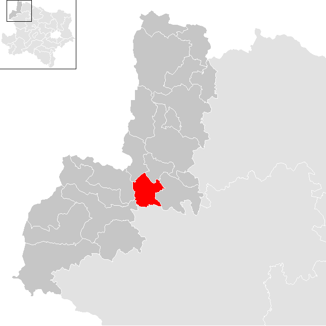 Bezirk Gmünd